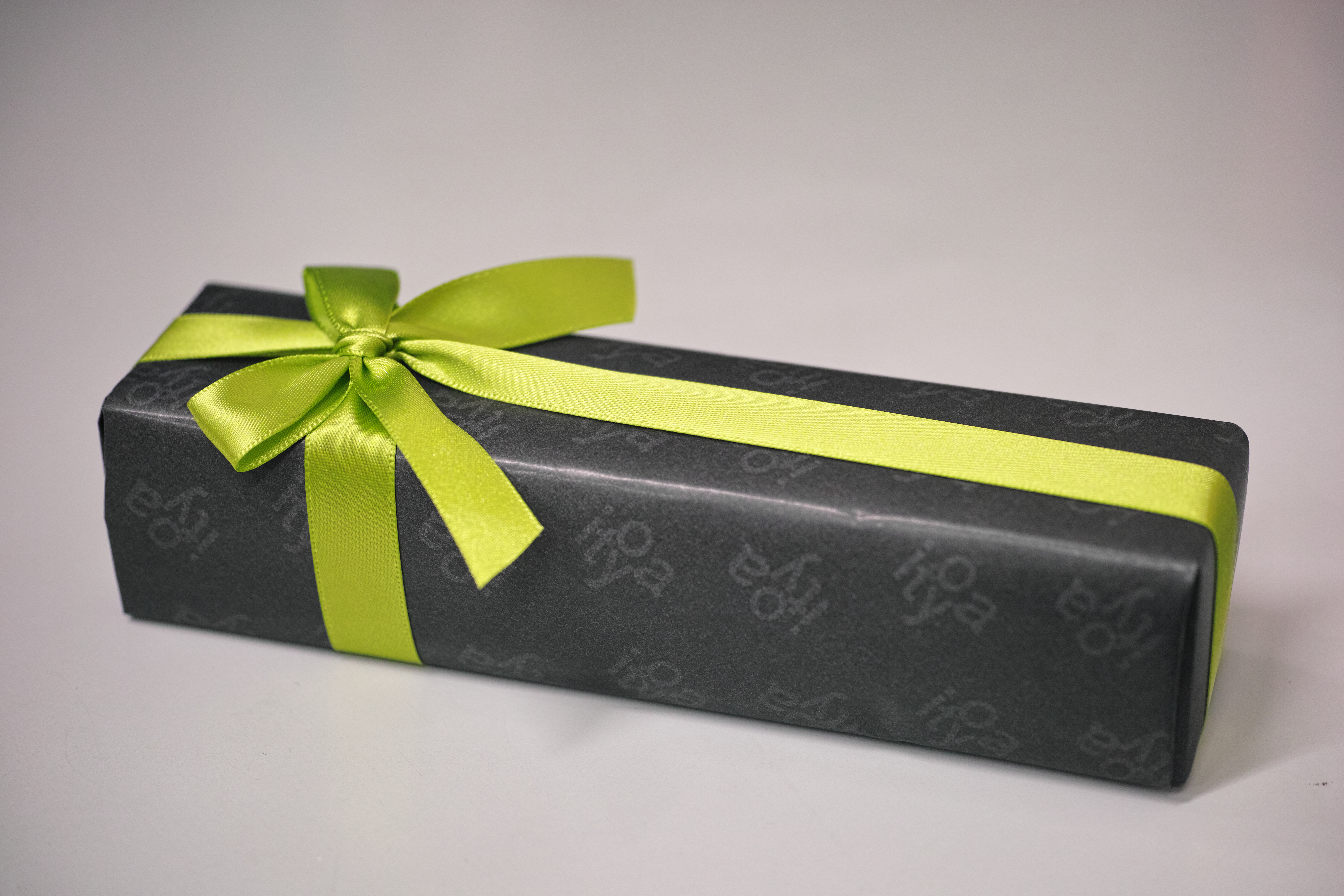 伊東屋